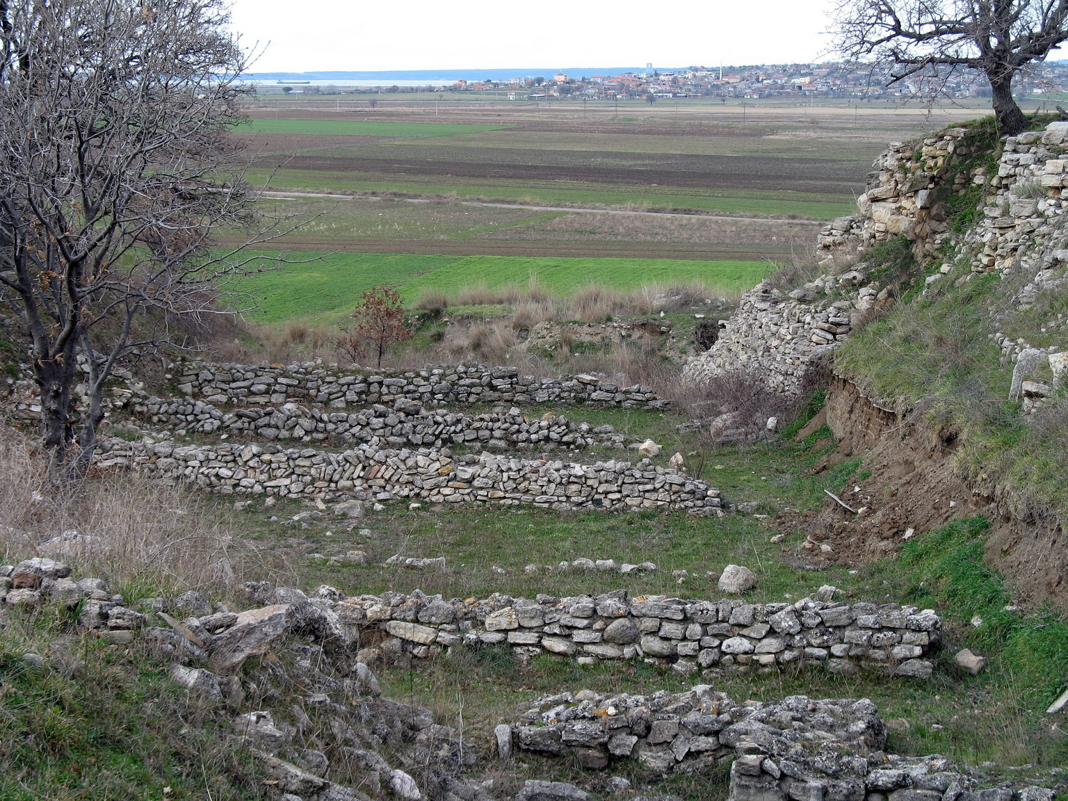 Troja-Blick über Schliemanngraben zu den Dardanellen